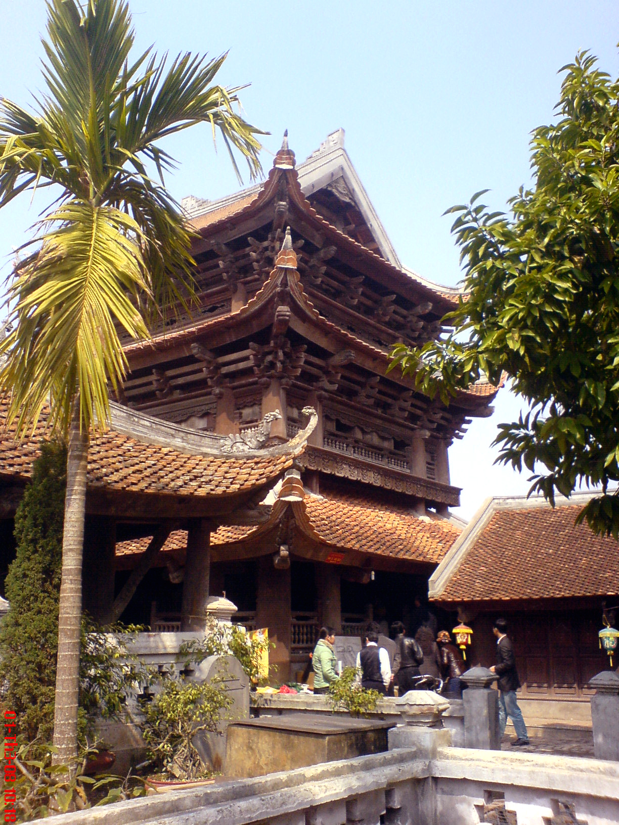 Keo Pagoda - Thai Binh - Viet Nam